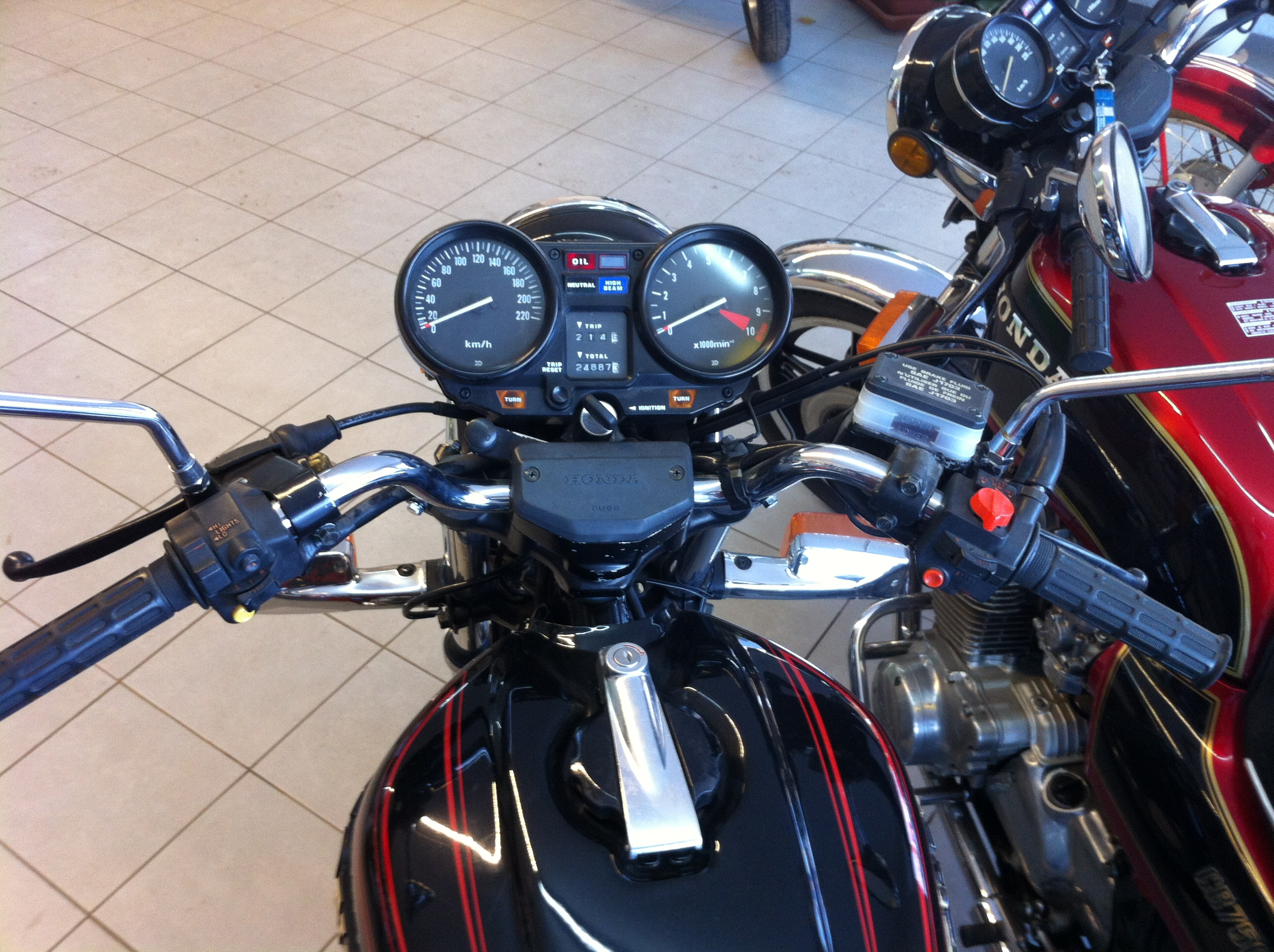 Instrumente einer CB750K(Z)